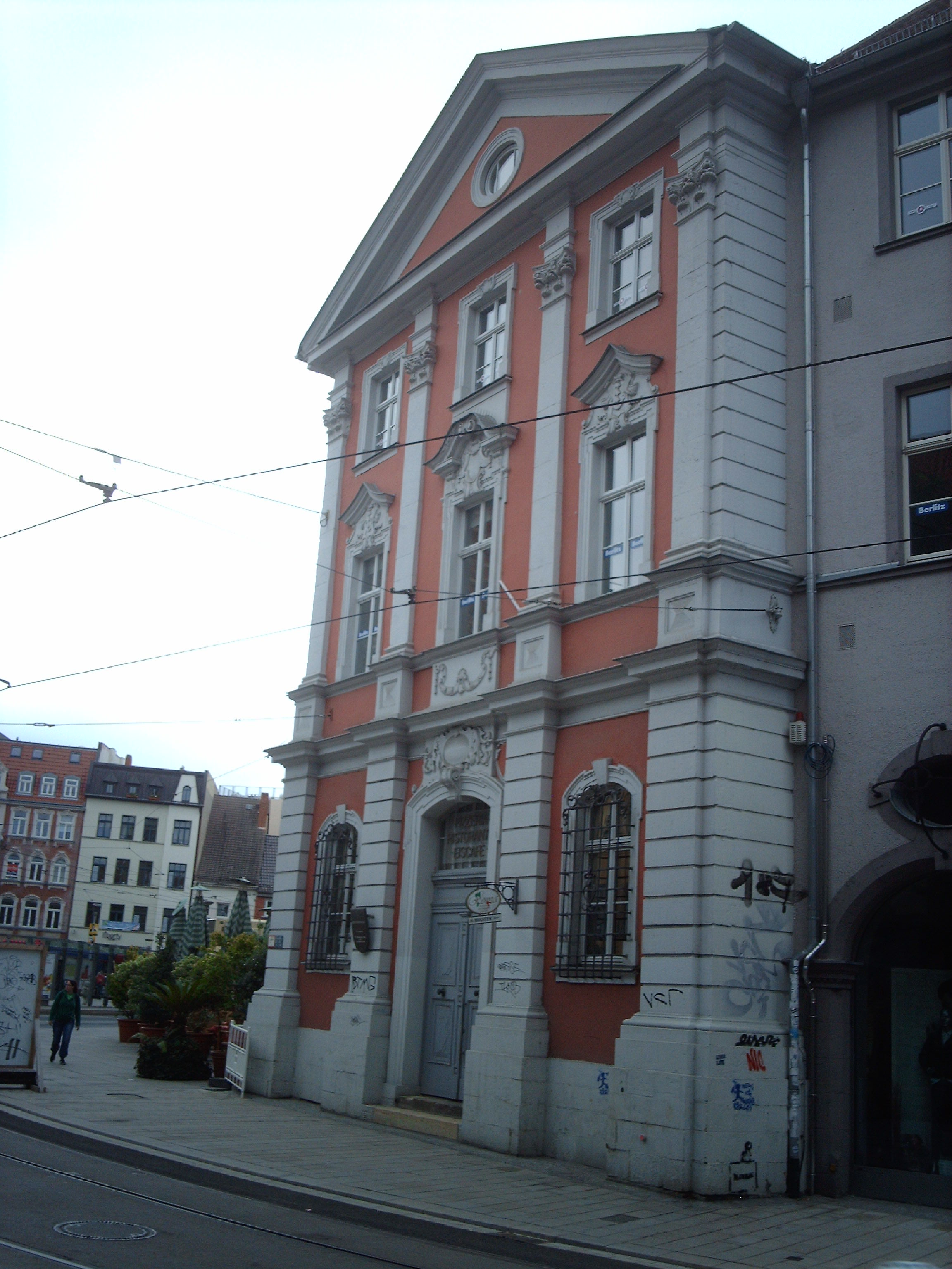 Ehemaliges Jesuitenkolleg in Erfurt, Schlösserstraße 5. Im Hintergrund hinten der Anger.